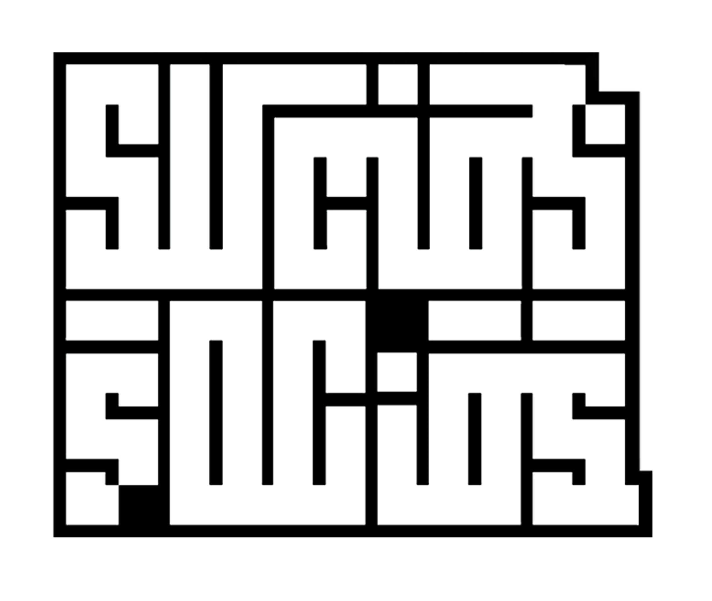 Logotipo de Sucios Socios